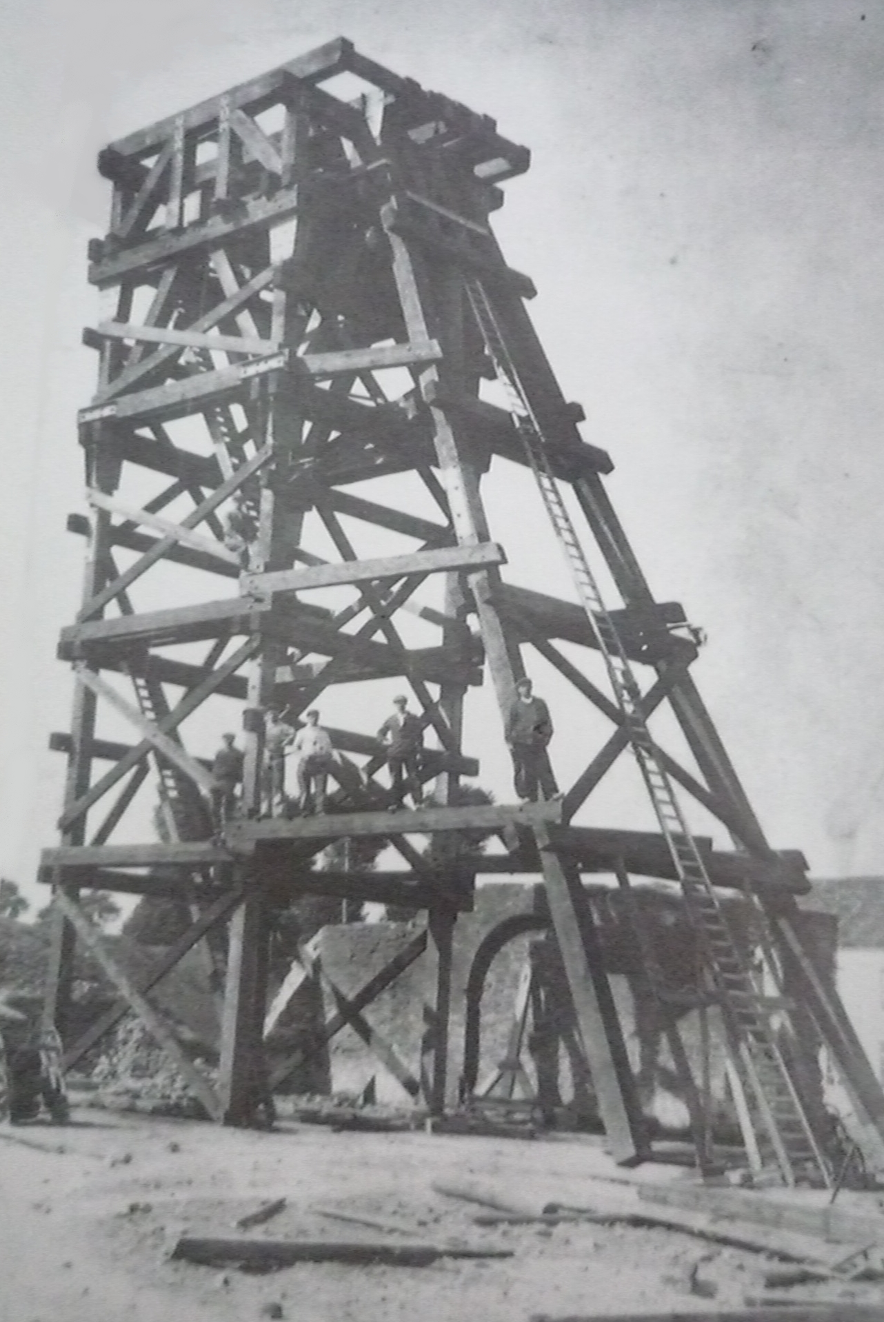 La Fosse n° 2 de la Compagnie des mines d'Auchy-au-Bois, devenue la Fosse n° 3 de la Compagnie des mines de Ligny-lès-Aire était un charbonnage constitué d'un seul puits situé à Auchy-au-Bois, Pas-de-Calais, Nord-Pas-de-Calais, France.